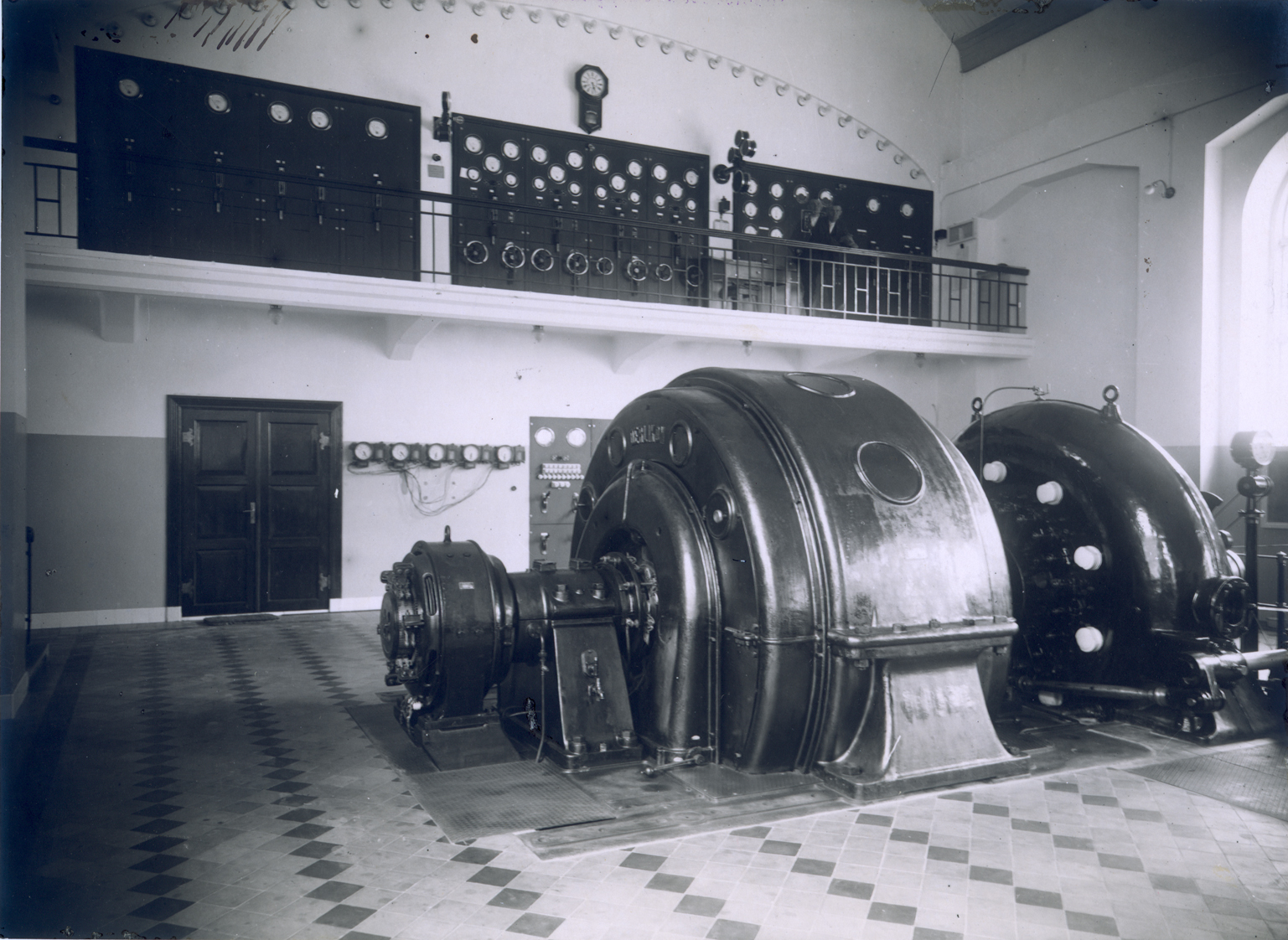 Herlandsfoss kraftstasjon. Interiør. Maskinsal. Brettet med instrumenttavler. Elektrisitetsdirektoratet. Dato: xx.xx.xxxx